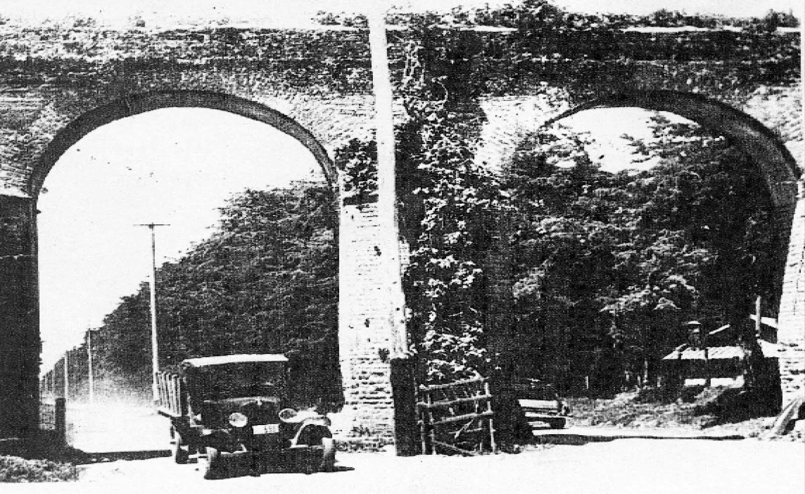 Acueducto de Los Arcos en 1923.